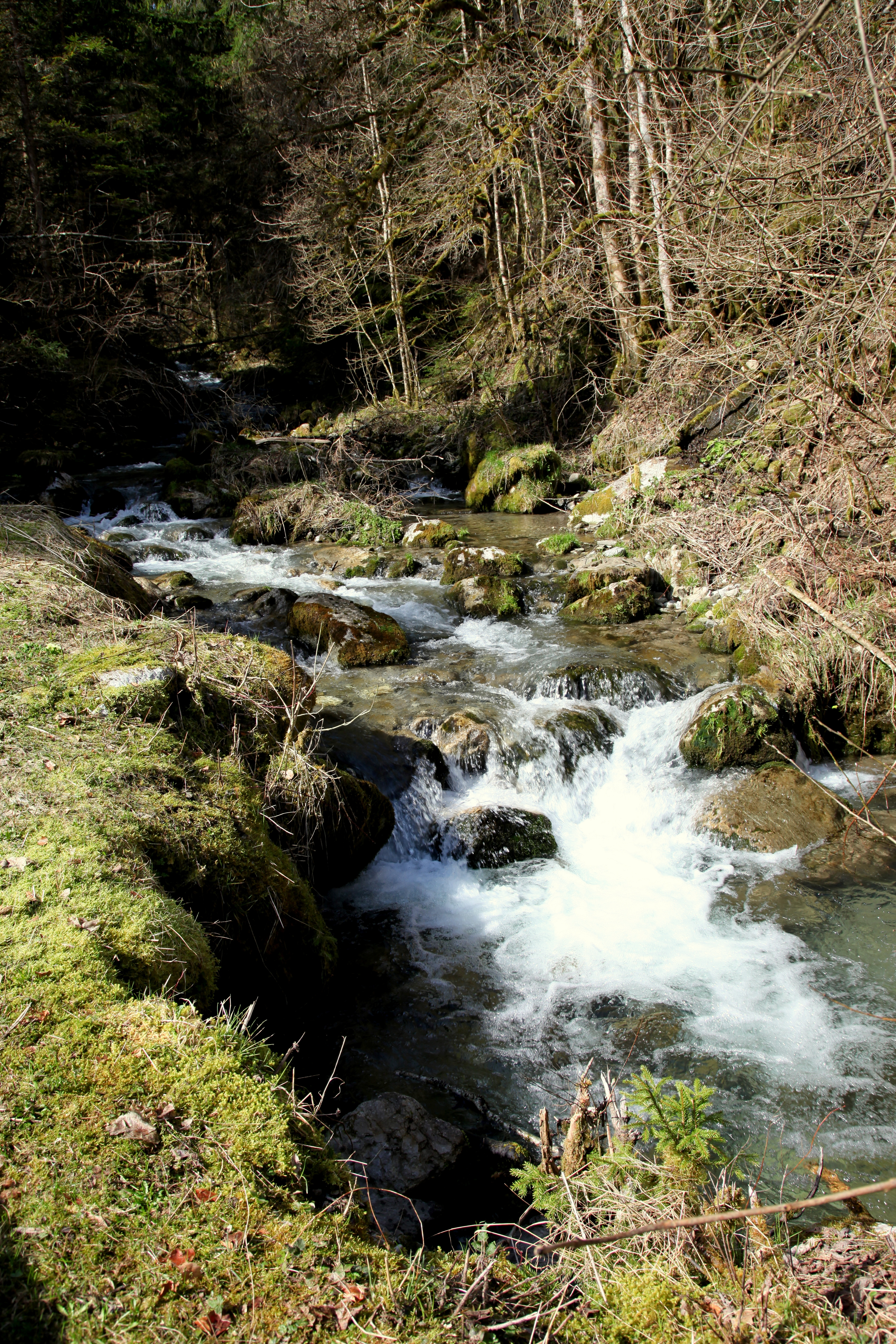 Template:L'Overan au Pont du Moulin